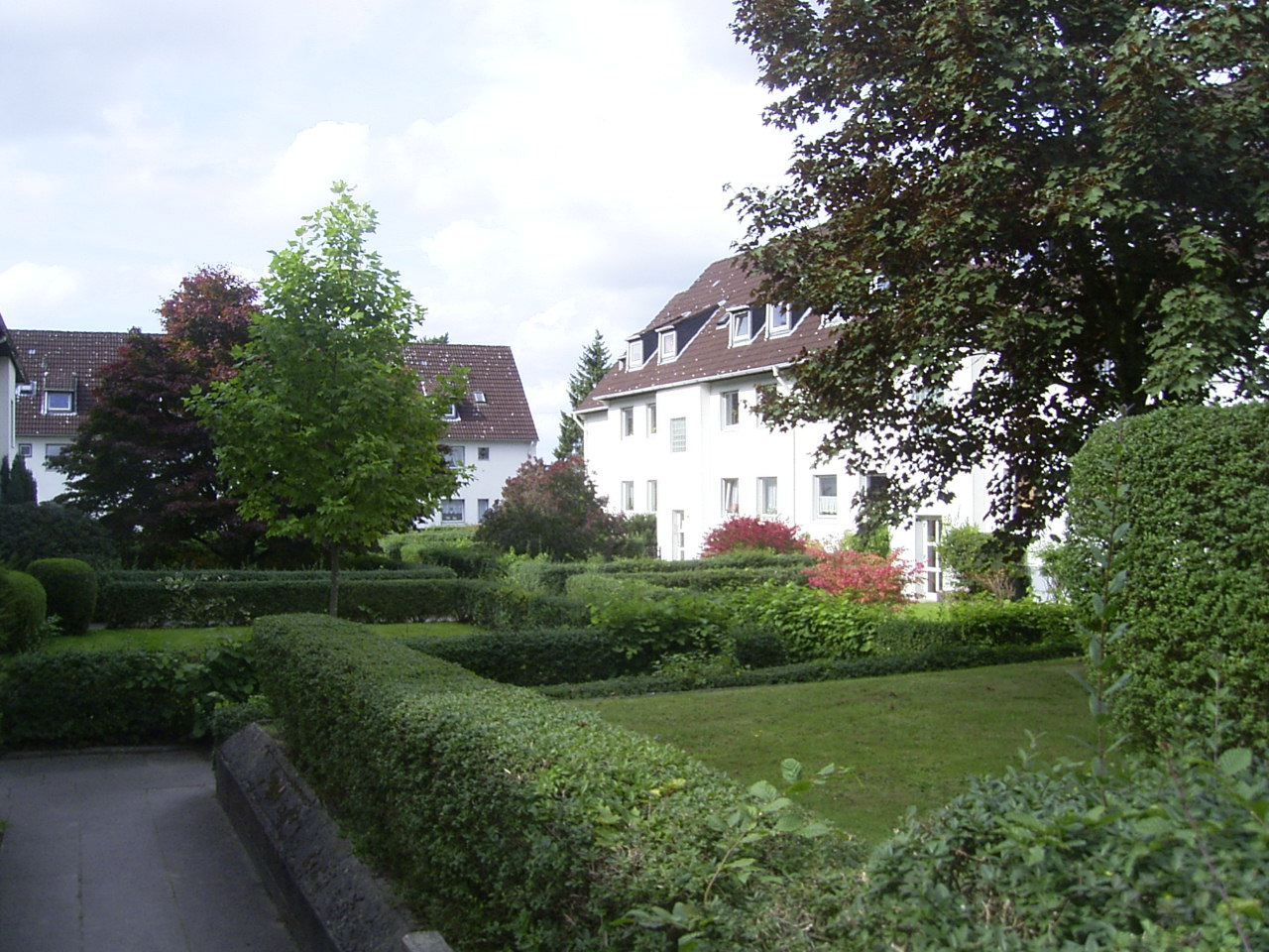 Die Wulffsche Siedlung in Langenhorn stammt im Kern aus dem Jahr 1942